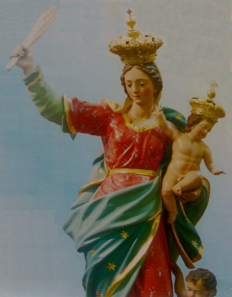 Statua di Maria Santissima del Soccorso, venerata nell'omonima chiesa parrocchiale di Palmi